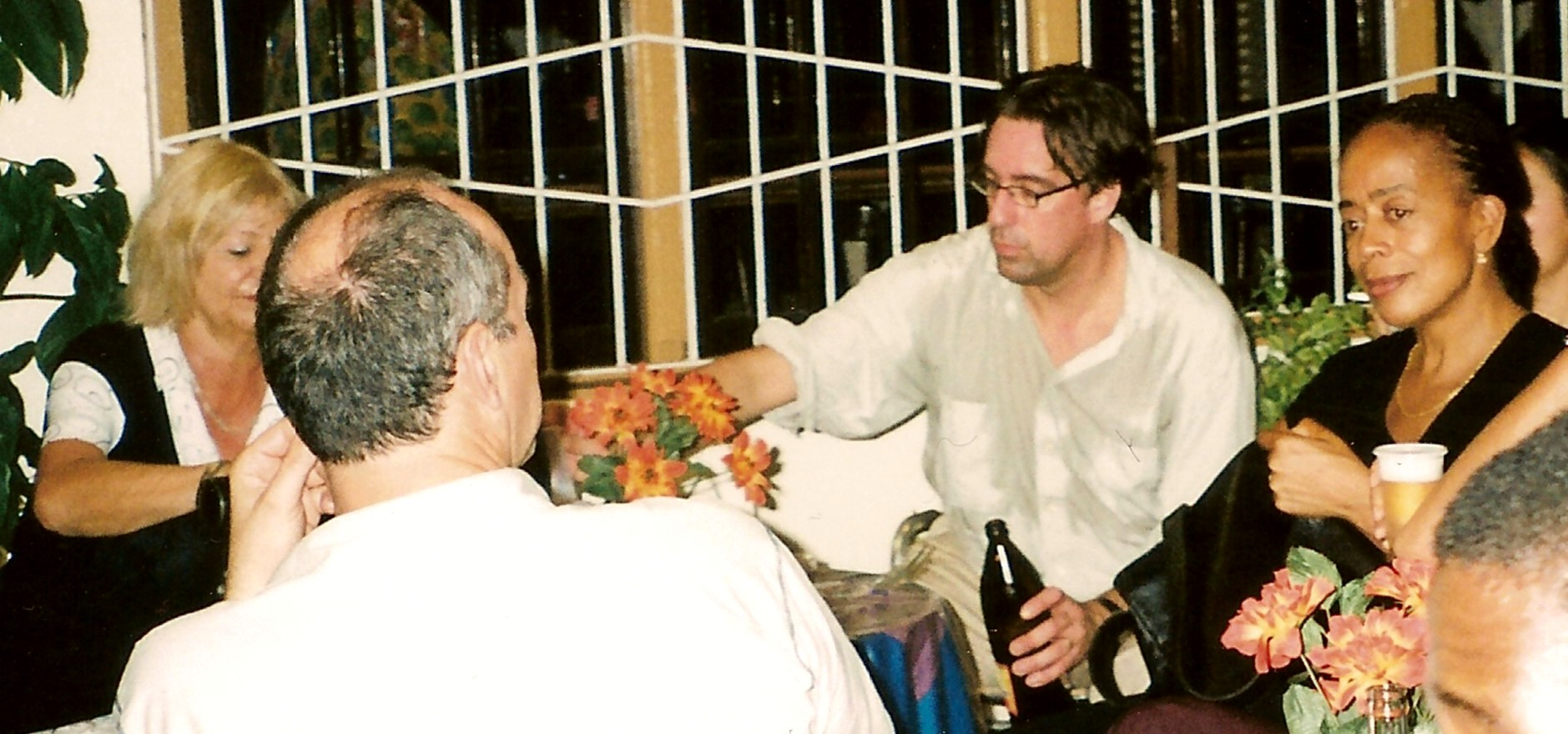 Ellen Ombre (geheel rechts), met v.l.n.r. Rudy Wester (directeur Nederlands Literair Productie Fonds) en de auteurs Michiel van Kempen en Joost Zwagerman; Paramaribo, nov. 2002.